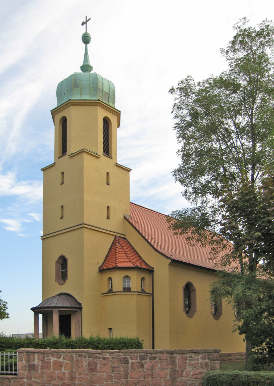 Kirche der Katholischen Gemeinde in Görzig (Deutschland, Sachsen-Anhalt).